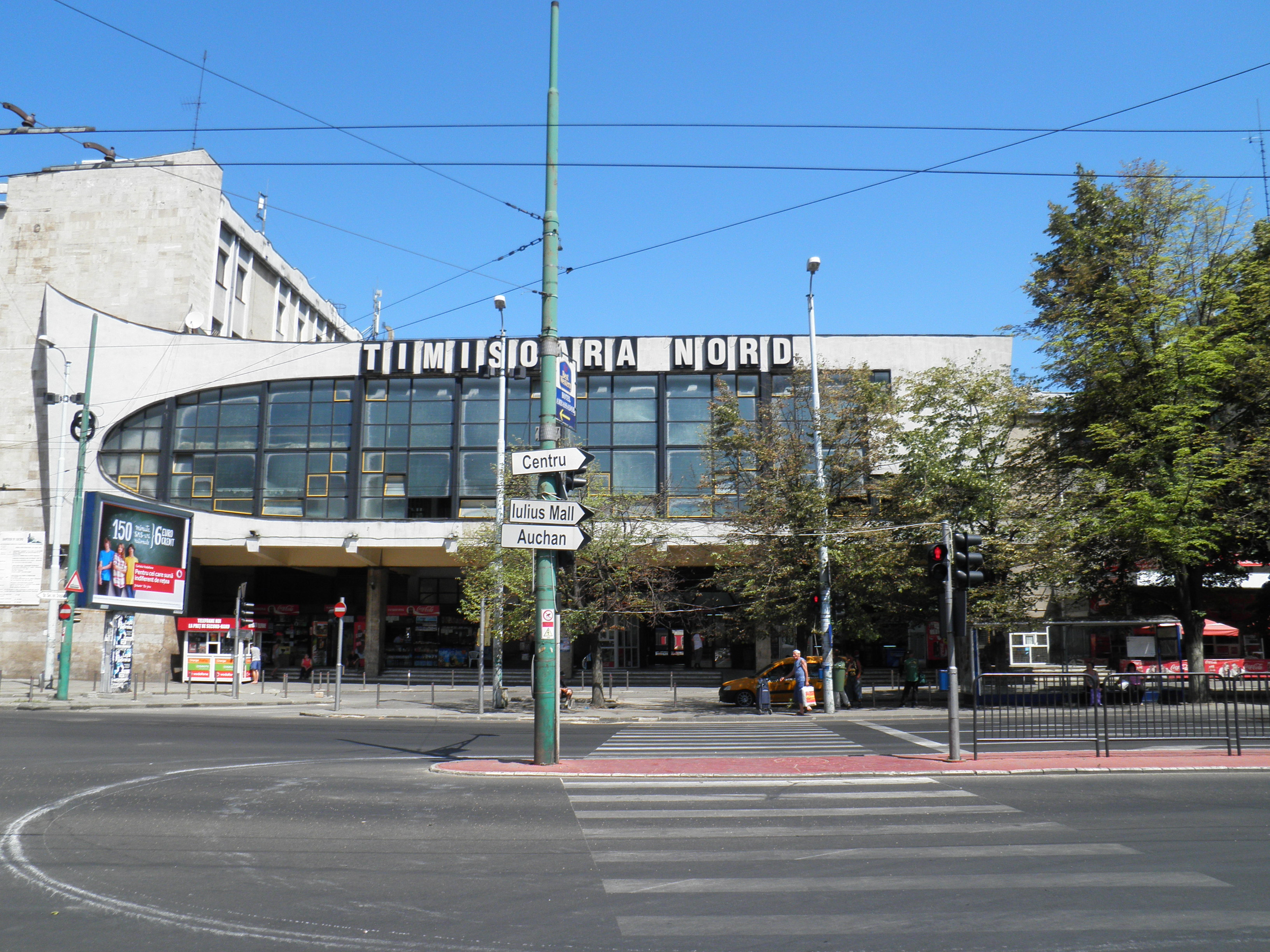 Gara de Nord